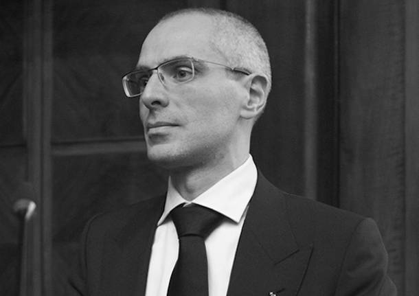 Pietro Vassalli nel 2016